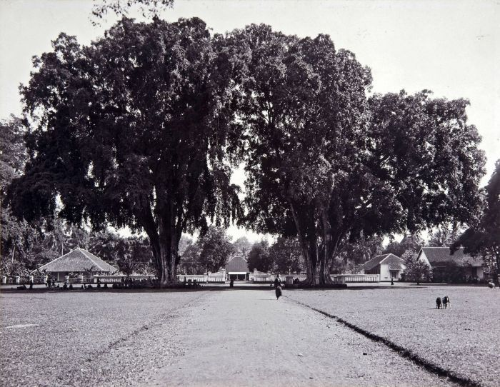 Foto. Een woning van een regent uit Poerbolinggo.